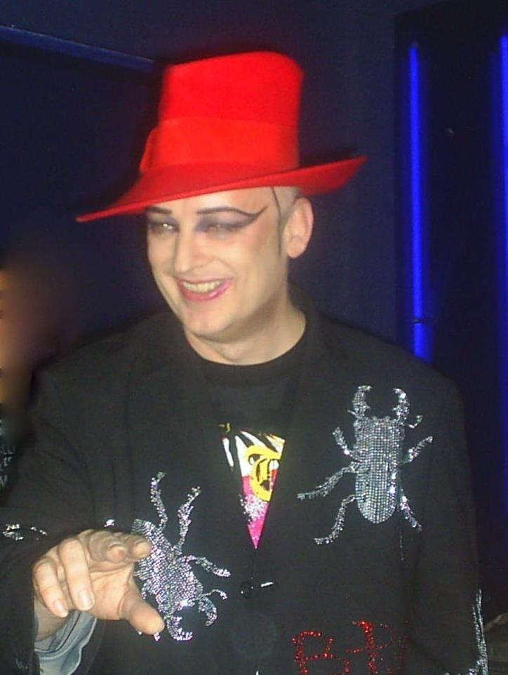 Boy George em sua apresentação como DJ na boate Pacha, em São Paulo, Brasil. O evento ocorreu em 14 de julho de 2007.